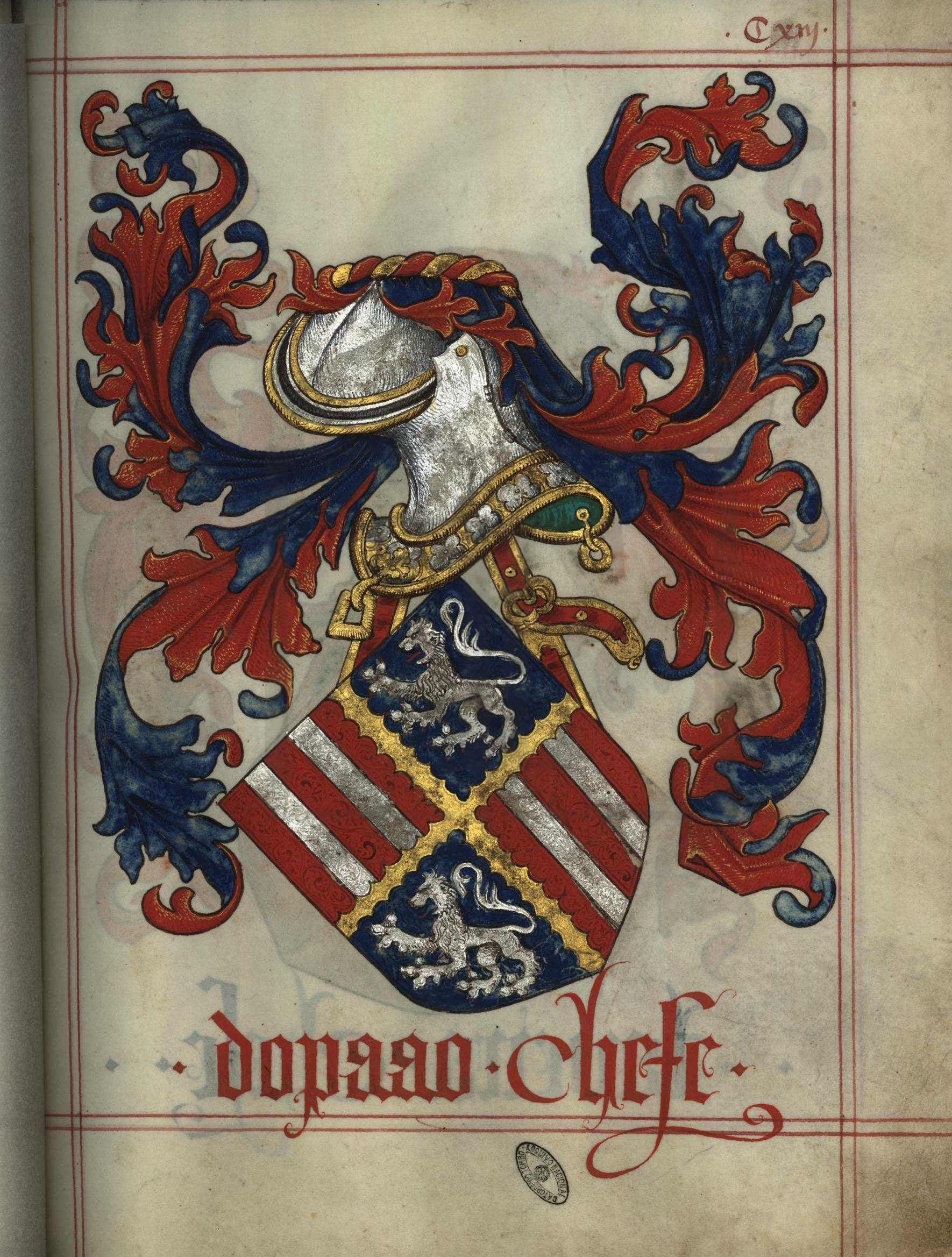 Livro do Armeiro-Mor, Pau (fl 113)